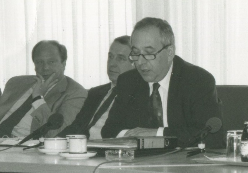 Peter Schiwy, damals Chefredakteur NDR Fernsehen (rechts) mit Verwaltungsdirektor Prof.Klaus Berg (später Intendant Hessischer Rundfunk) und Hörfunkdirektor Roman Köster